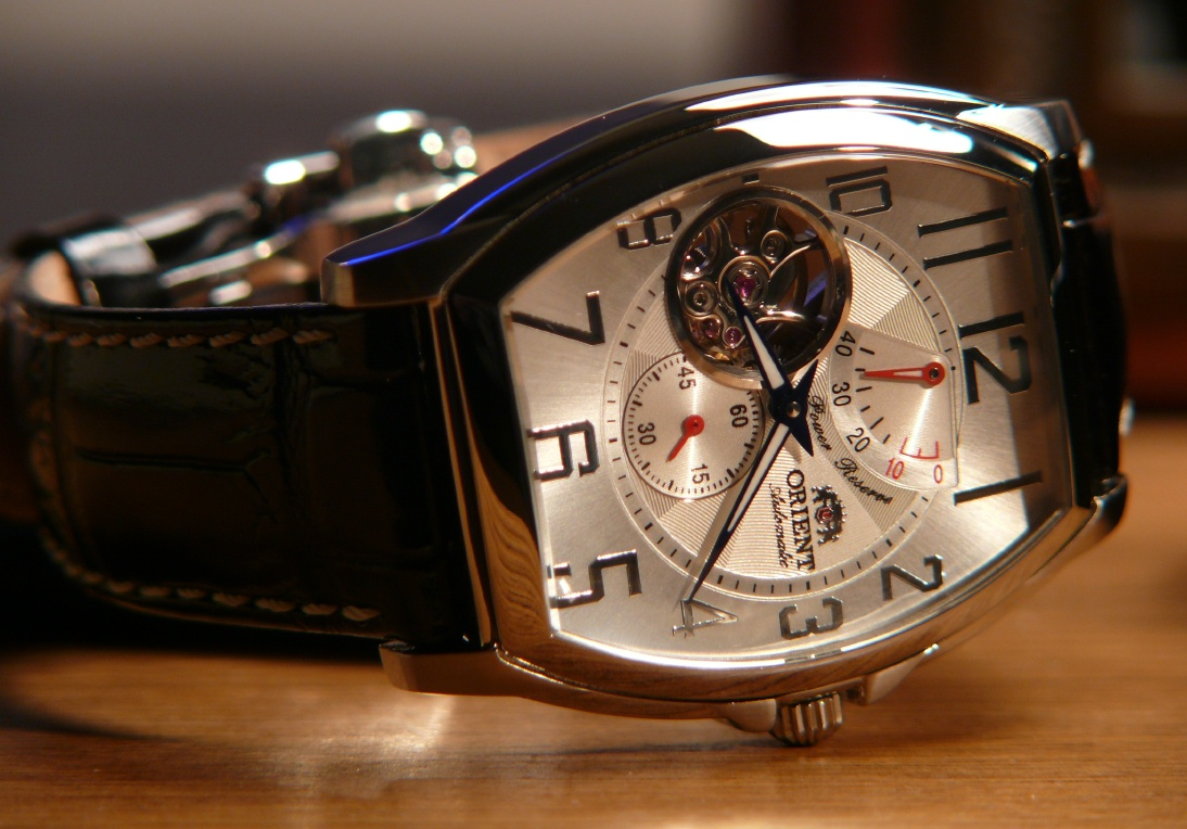 CFHAA004W Orient Watch